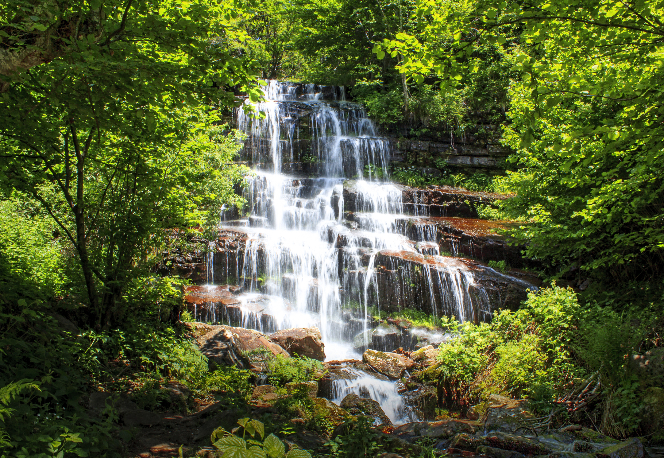 Ово је фотографија заштићеног природног добра у Србији под шифром: ПП16 This is a a photo of a natural area in Serbia with ID: ПП16 предивни водопад Тупавица на обронцима Старе планине